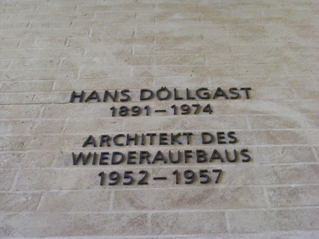 "Hans Döllgast 1891- Architekt des Wiederaufbaus 1952-1957" - Entrance hall of Alte Pinakothek, Munich